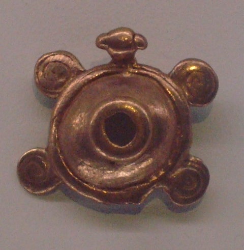 Pendiente de oro con forma de tortuga, de la cultura de los quepoa, Pacífico sur de Costa Rica. Museo del oro precolombino, San José de Costa Rica.